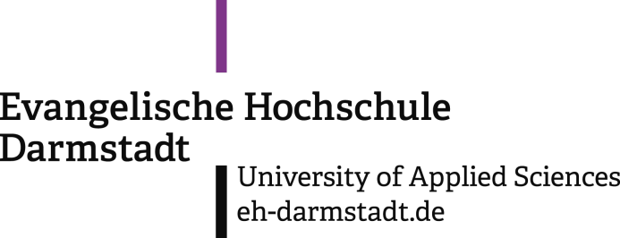 Logo der Evangelischen Hochschule Darmstadt (vormals Evangelische Fachhochschule)